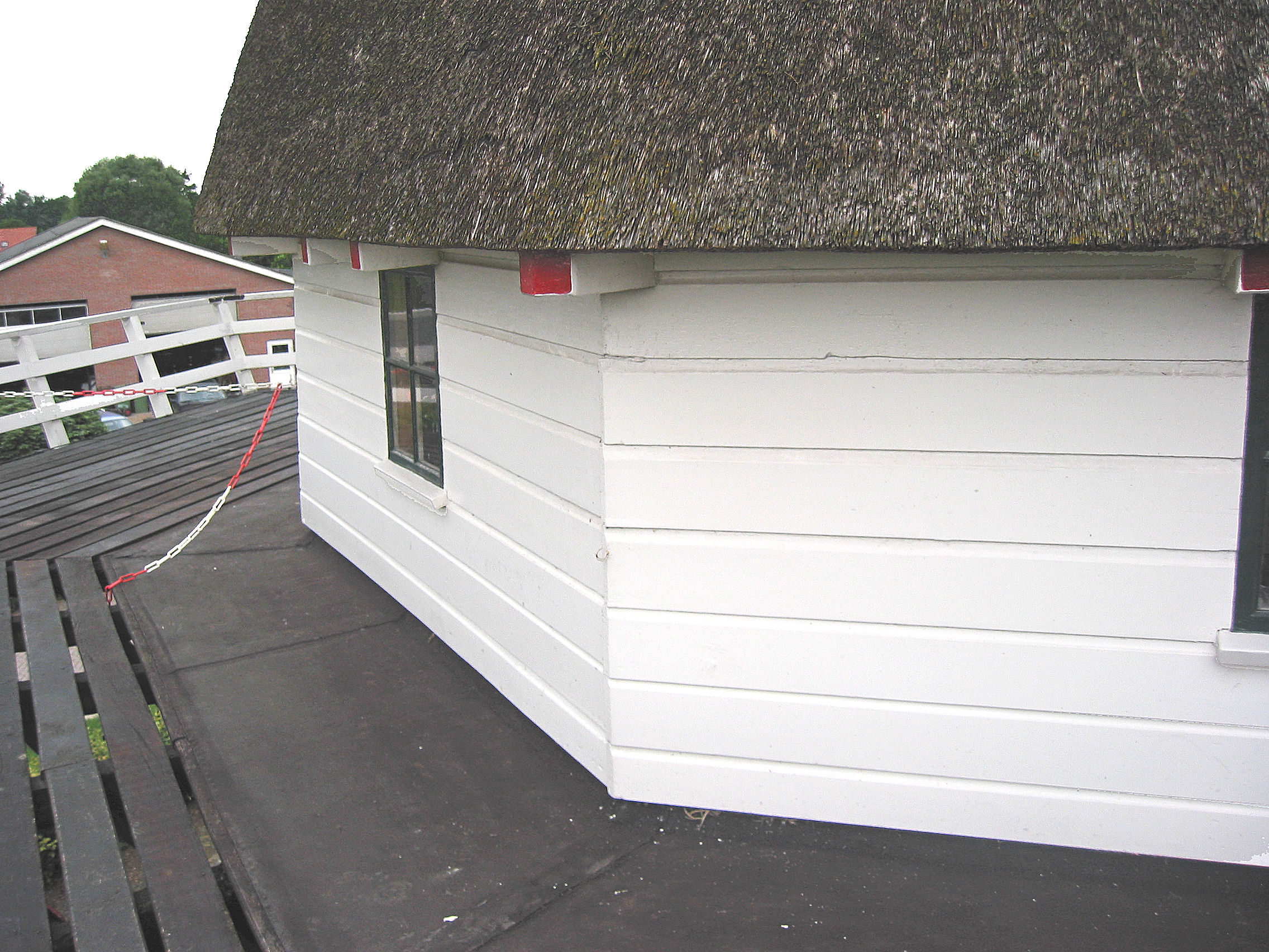 Potdekselwerk Walderveensemolen in Walderveen, Gelderland, the Netherlands